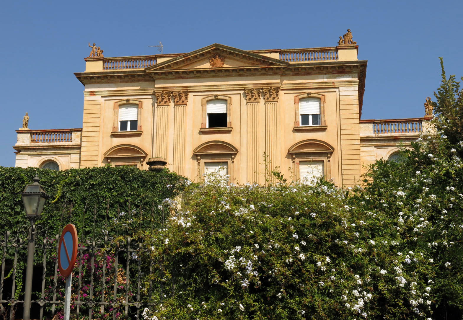 Cal Pallejà (Montgat) Object location41° 28′ 11.97″ N, 2° 17′ 13.41″ E